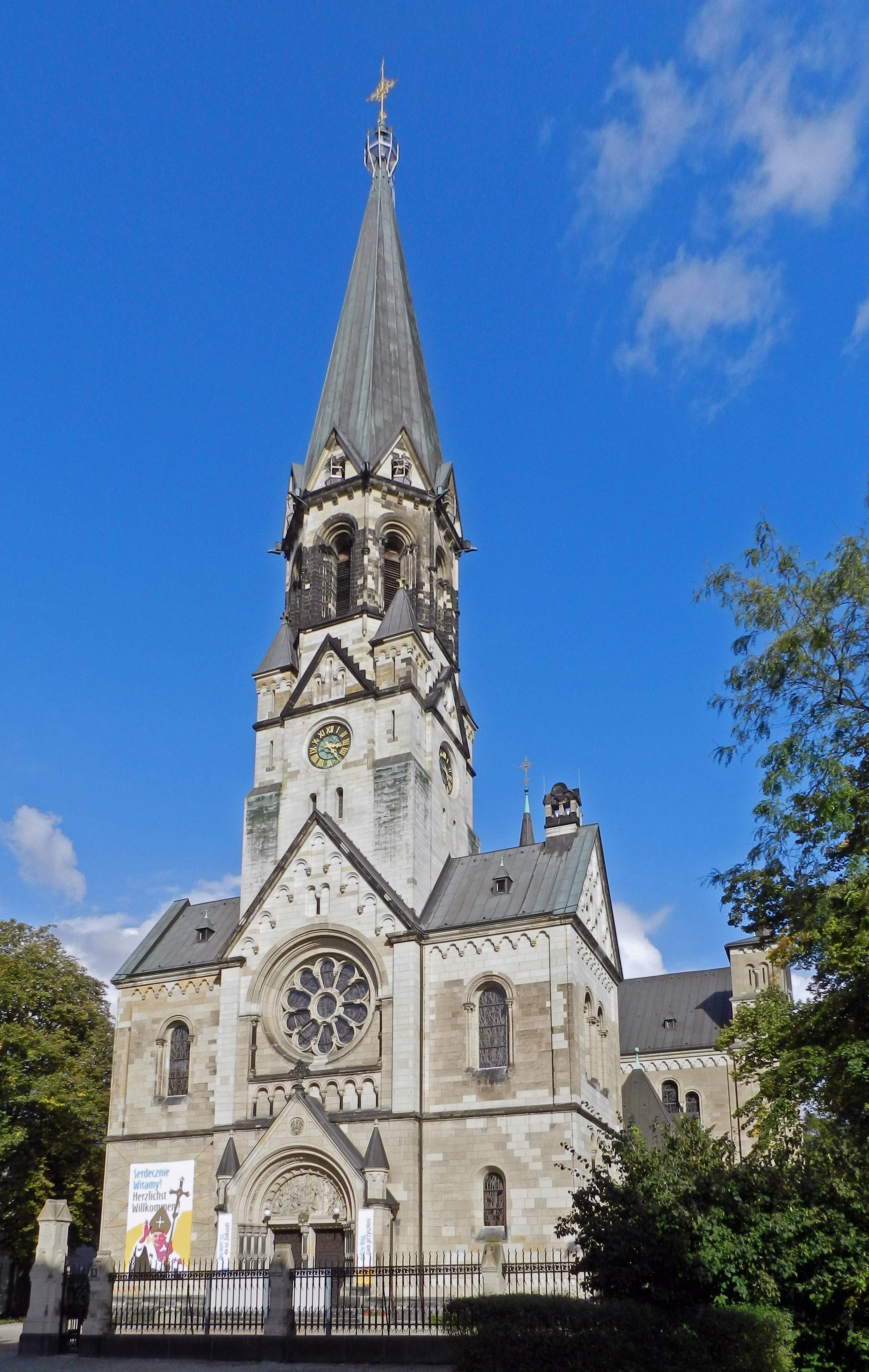 St. Johannes-Basilika & kath. Garnisonkirche, Lilienthalstraße 5, Berlin-Neukölln